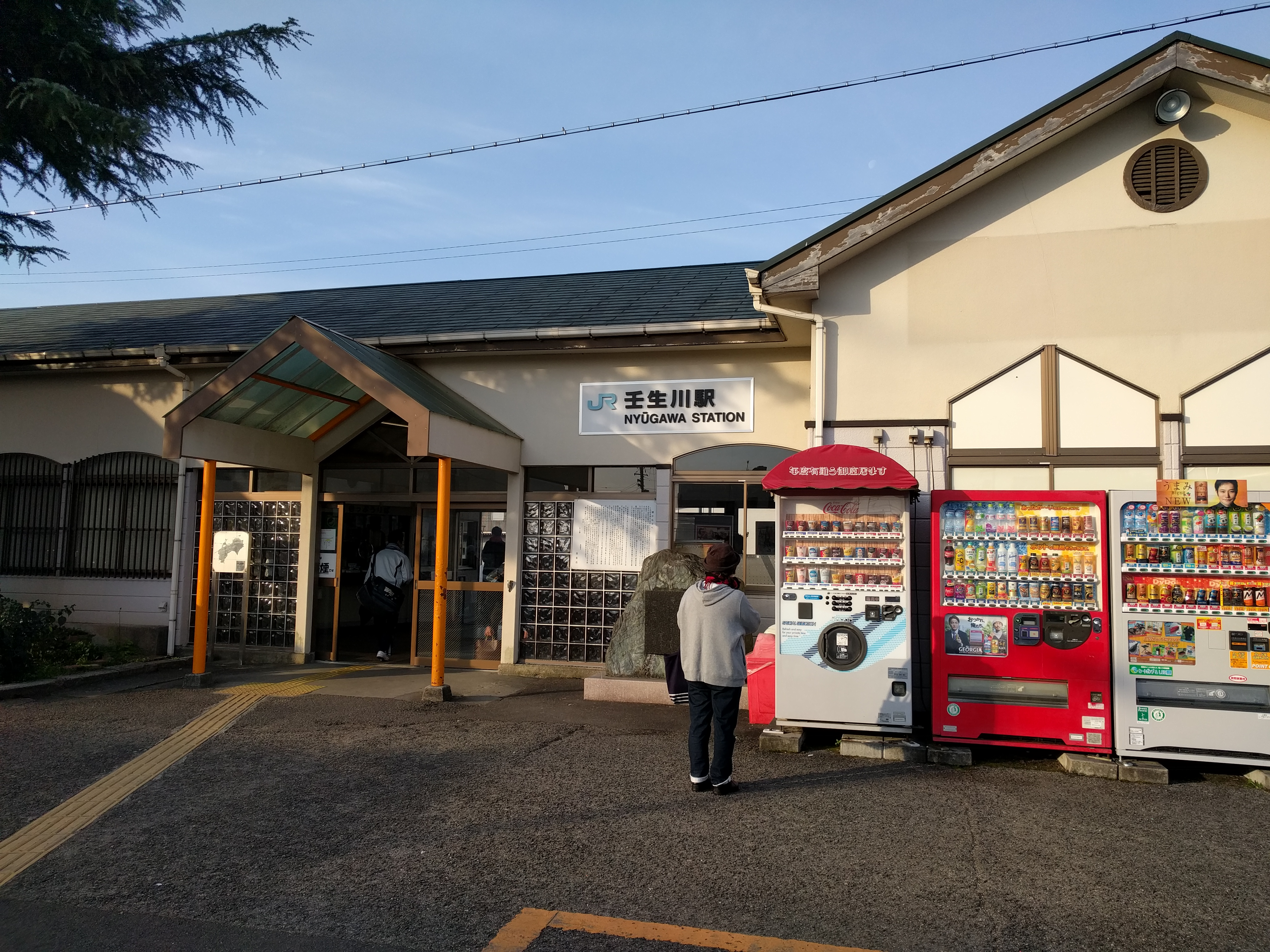 JR壬生川駅